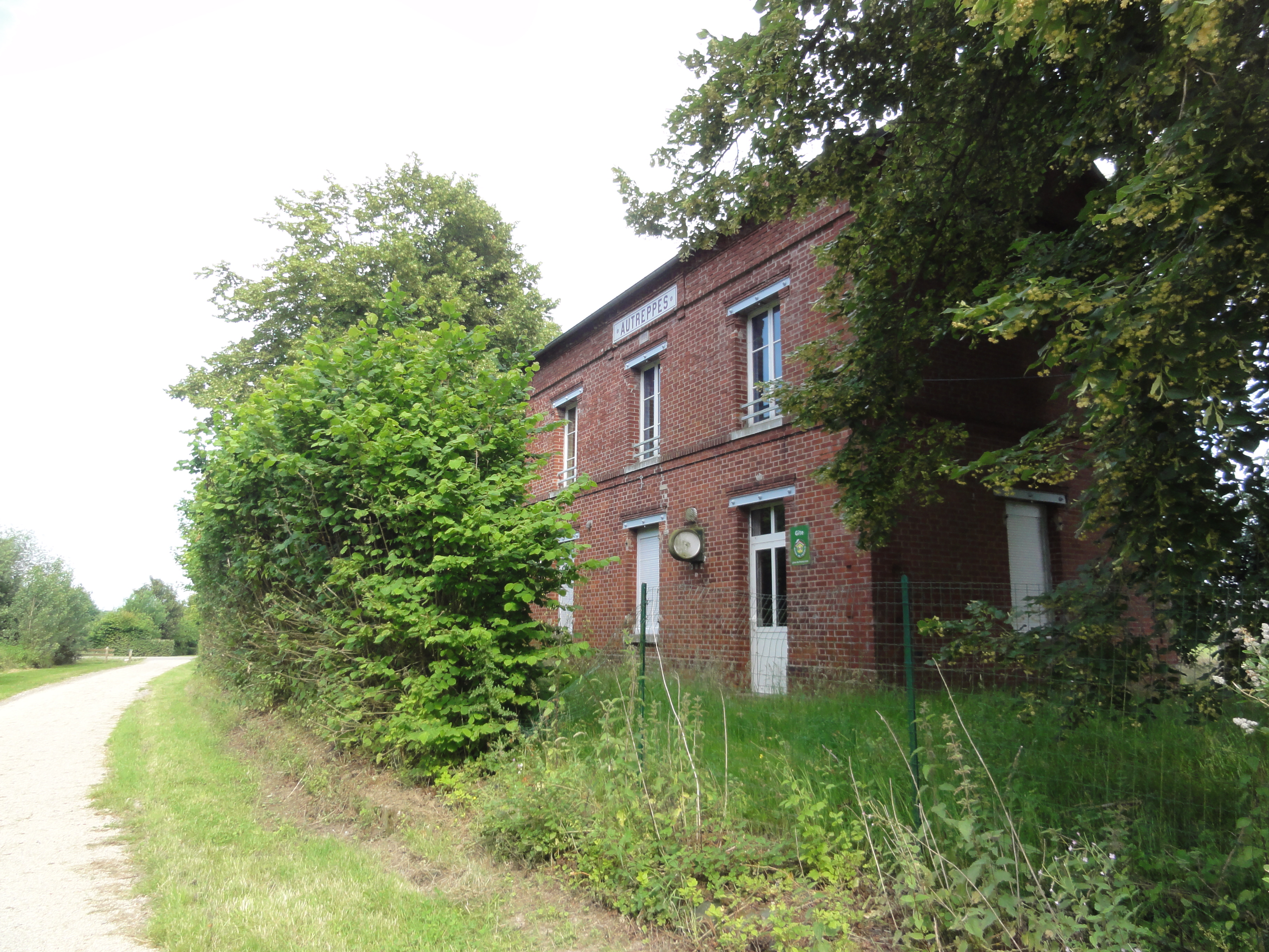 Autreppes (Aisne) Axe vert, ancienne gare